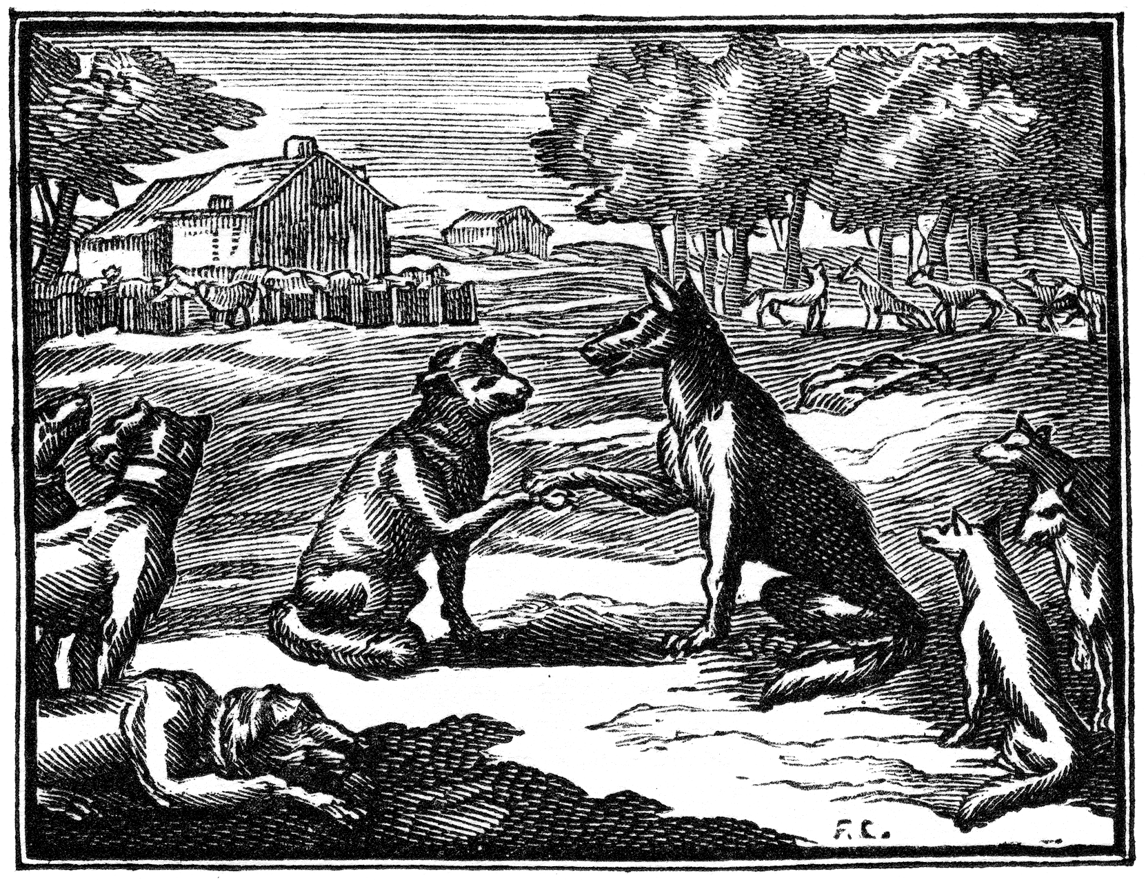 Illustrations pour les « Fables choisies mises en vers par M. de la Fontaine », Claude Barbin et Denys Thierry, Paris, 1668 (premier recueil) 1678-79 (deuxième recueil) 1694 (troisième recueil). Numérotation Charpentier (1705).